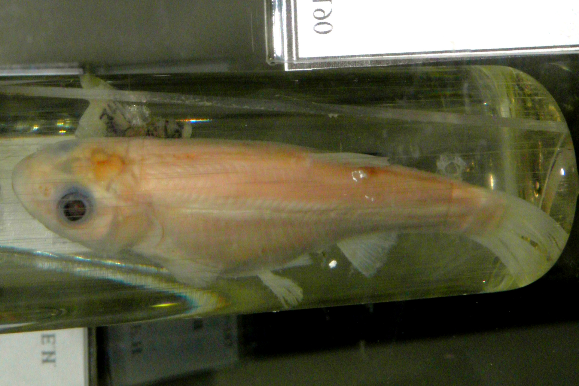 Phoxinus czekanowskii — гольян Чекановского